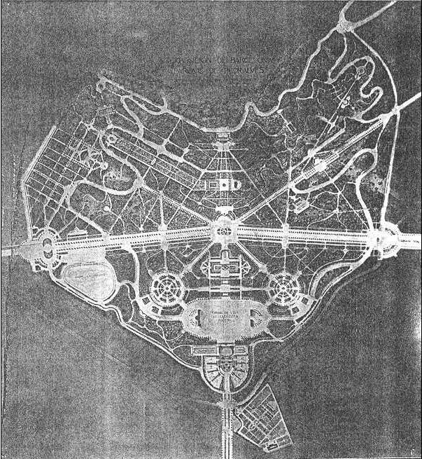 Projecte de Forestier per al Parc de Pedralbes, de 1916. Hauria implicat la transformació de bona part de Pedralbes i del terme d'Esplugues de Llobregat, i de la falda de la muntanya de Sant Pere Màrtir.